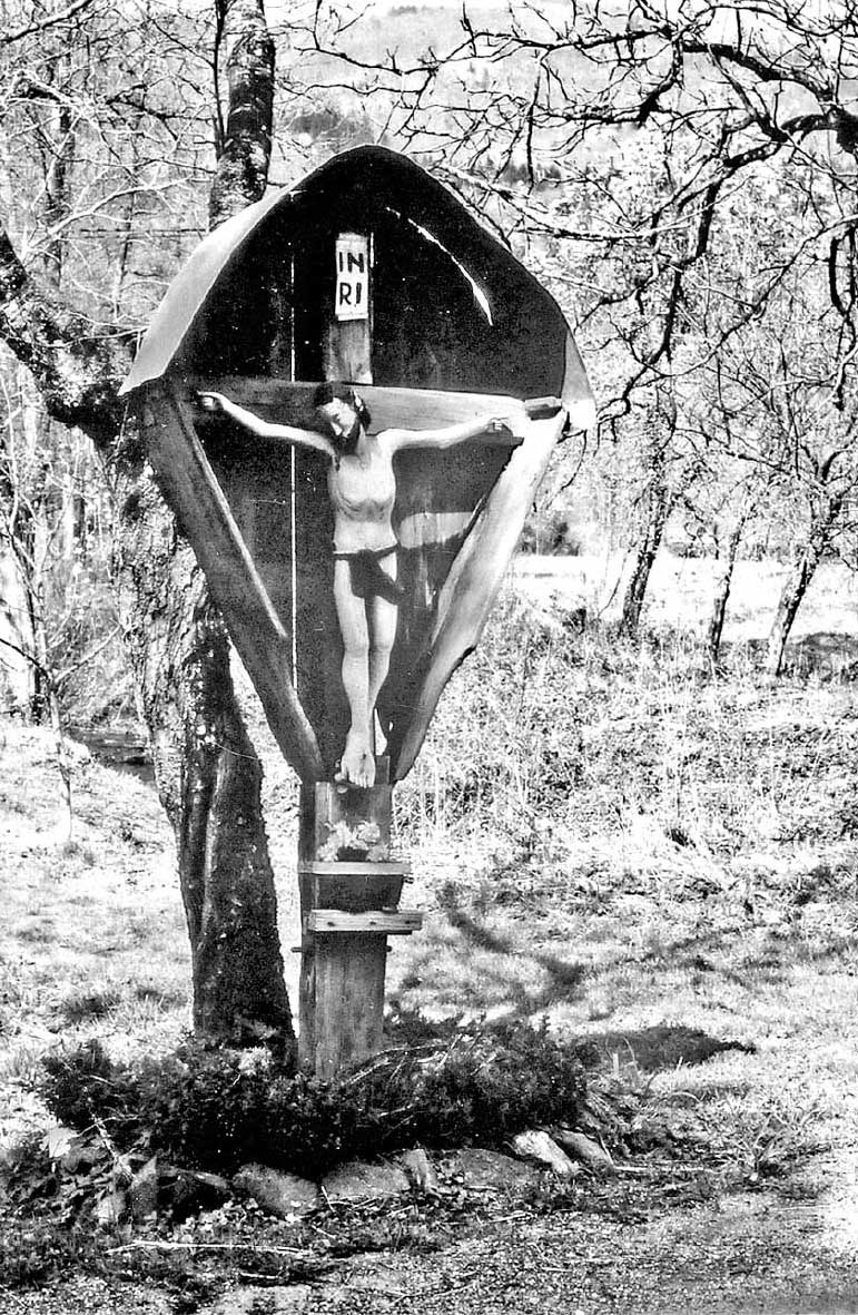 Bogac - Belo